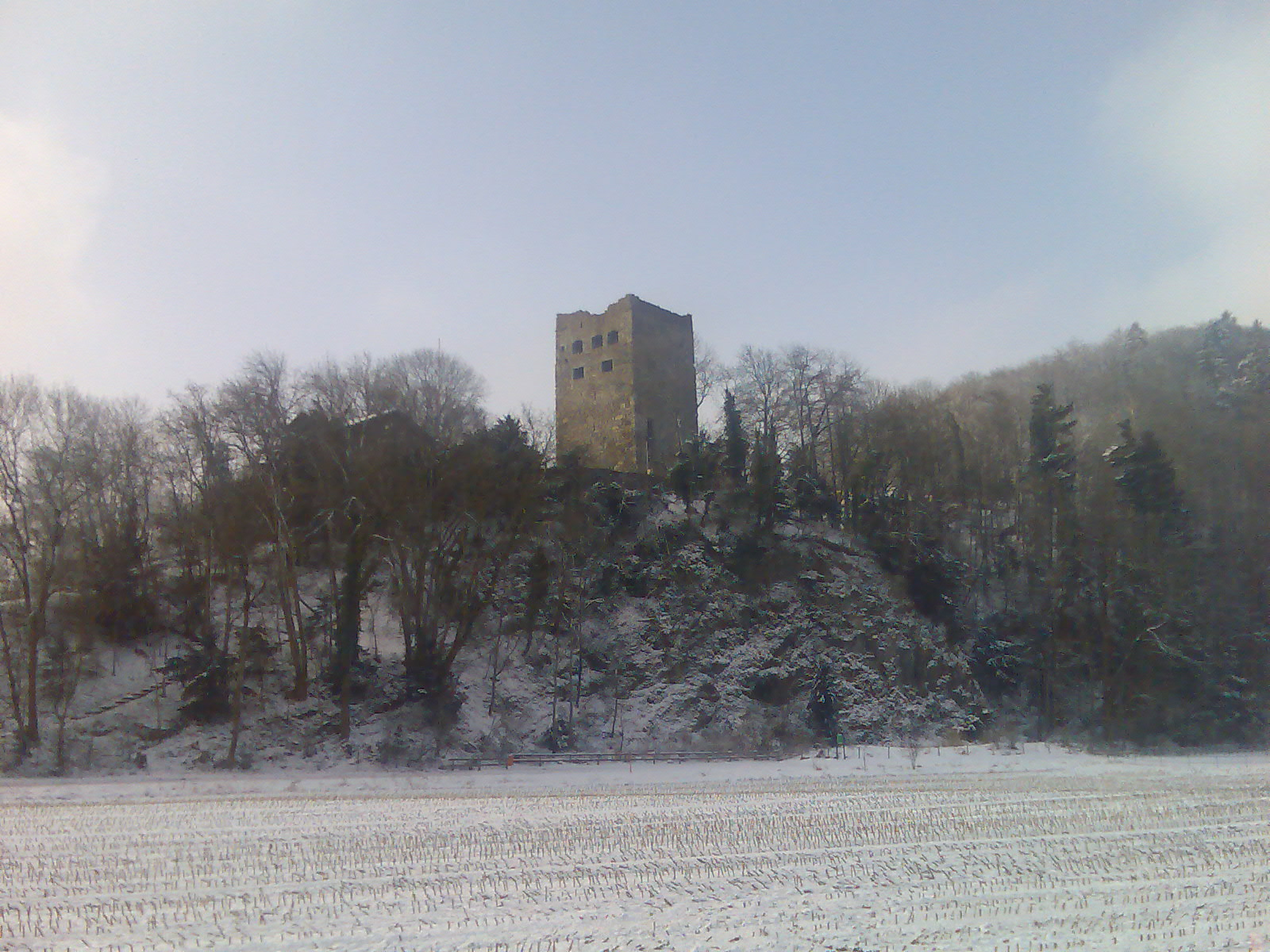 Burgruine "Schloss Blatten" aus nord-nordöstlicher Richtung